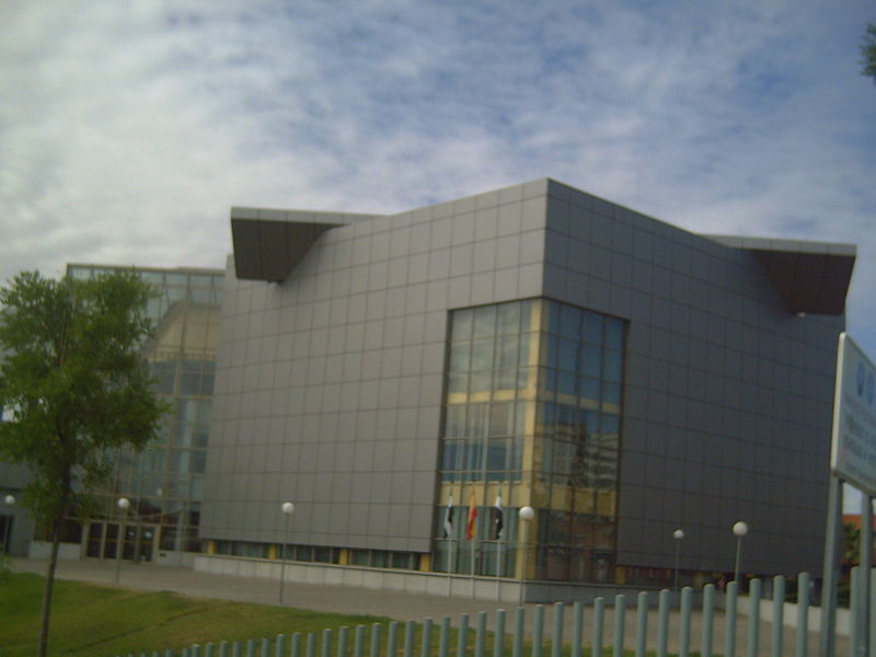 Bibliuteca Púbrica el Estau en Méria